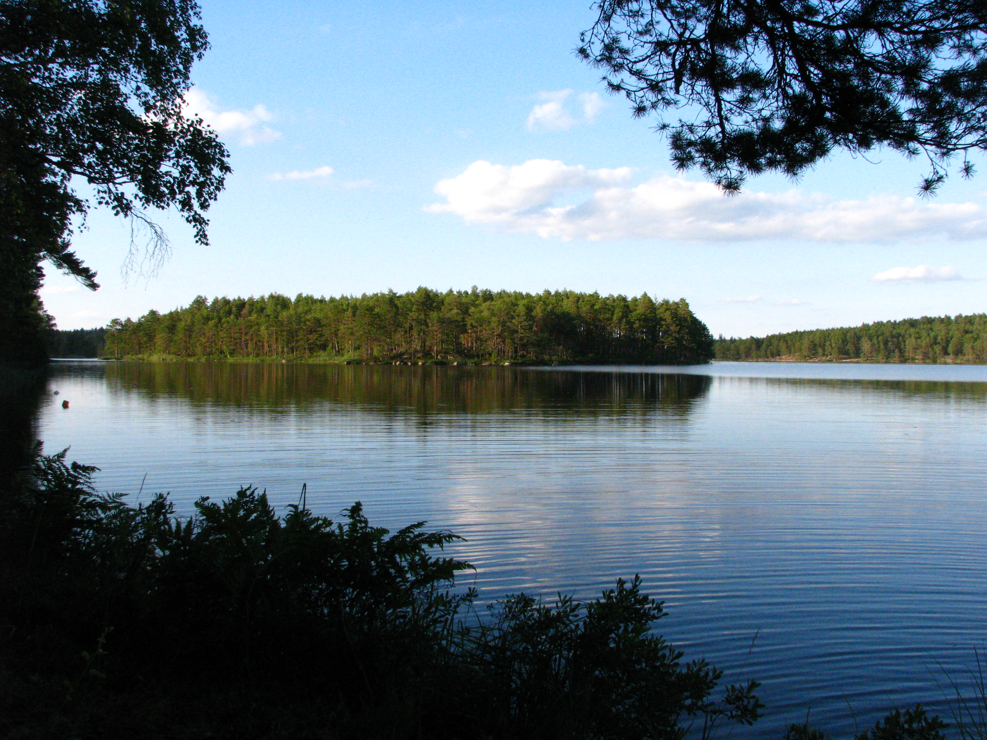 Stora Hammarsjö i Hultsfreds kommun. Fotot taget från den sydvästra delen.